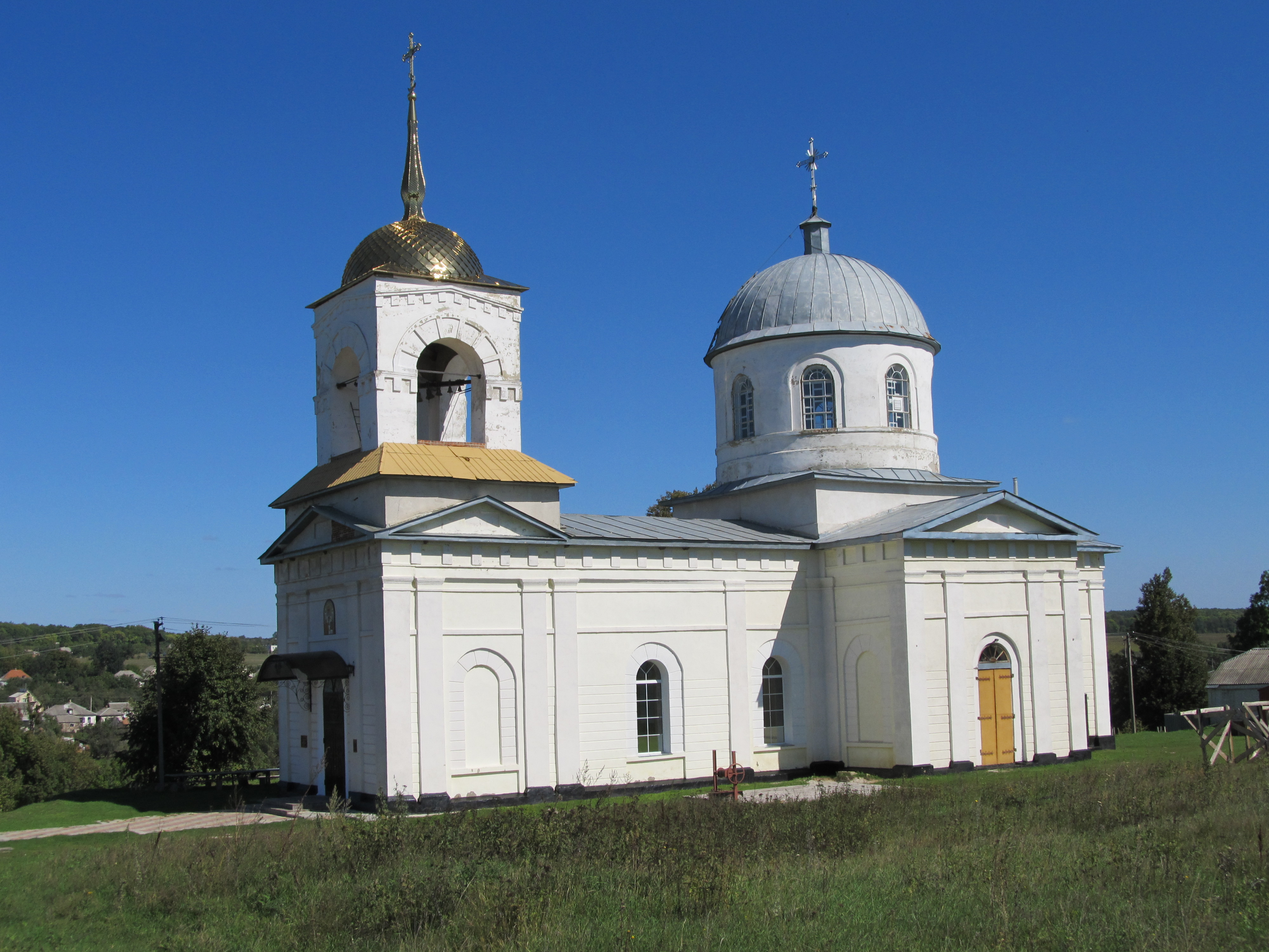 Свято-Николаевская церковь в Люботине является частью дворцово-паркового комплекса усадьбы "Гиевка", последним хозяином которой был харьковский генерал-губернатор, князь Д. Святополк-Мирсикй. Церковь в стиле классицизма стоит на холме над прудом на одной оси с дворцом Святополк-Мирских. В советские времена здание использовалось в качестве склада зерна, пострадало во время Второй мировой войны. В настоящее время отреставрированная Николаевская церковь снова принимает прихожан.